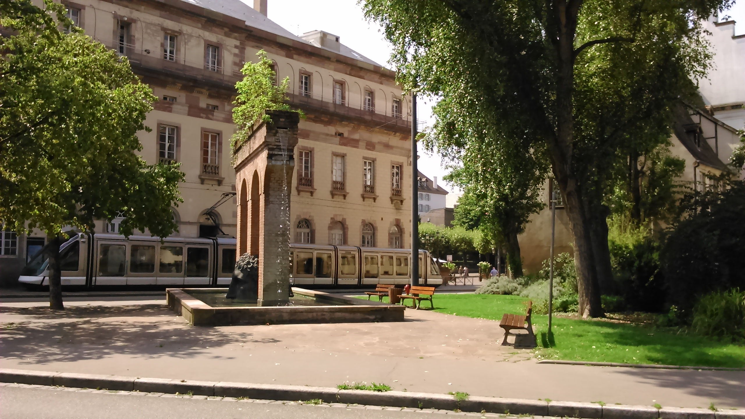 La fontaine Janus à Strasbourg, place Broglie.